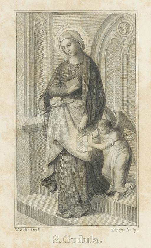 Sainte Gudule